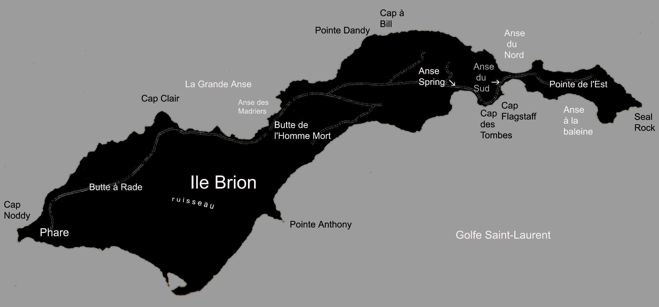 Carte en noir et blanc de l'île Brion